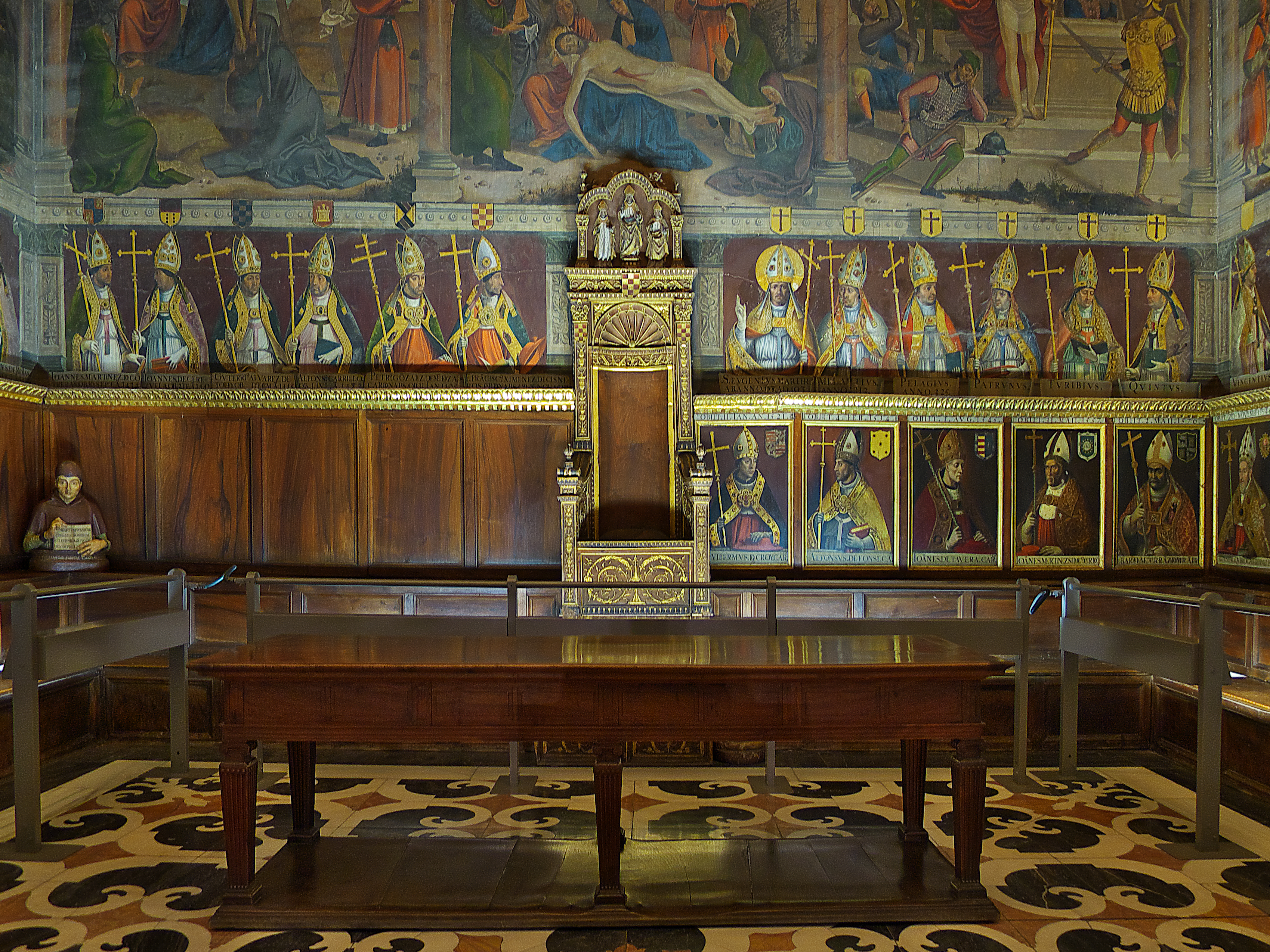 Construída por Enrique Egas y Pedro Gumiel a petición del Cardenal Cisneros. Exquisitamente decorada con pinturas de Juan de Borgoña (1509-1511), principalmente, y soberbio artesonado.